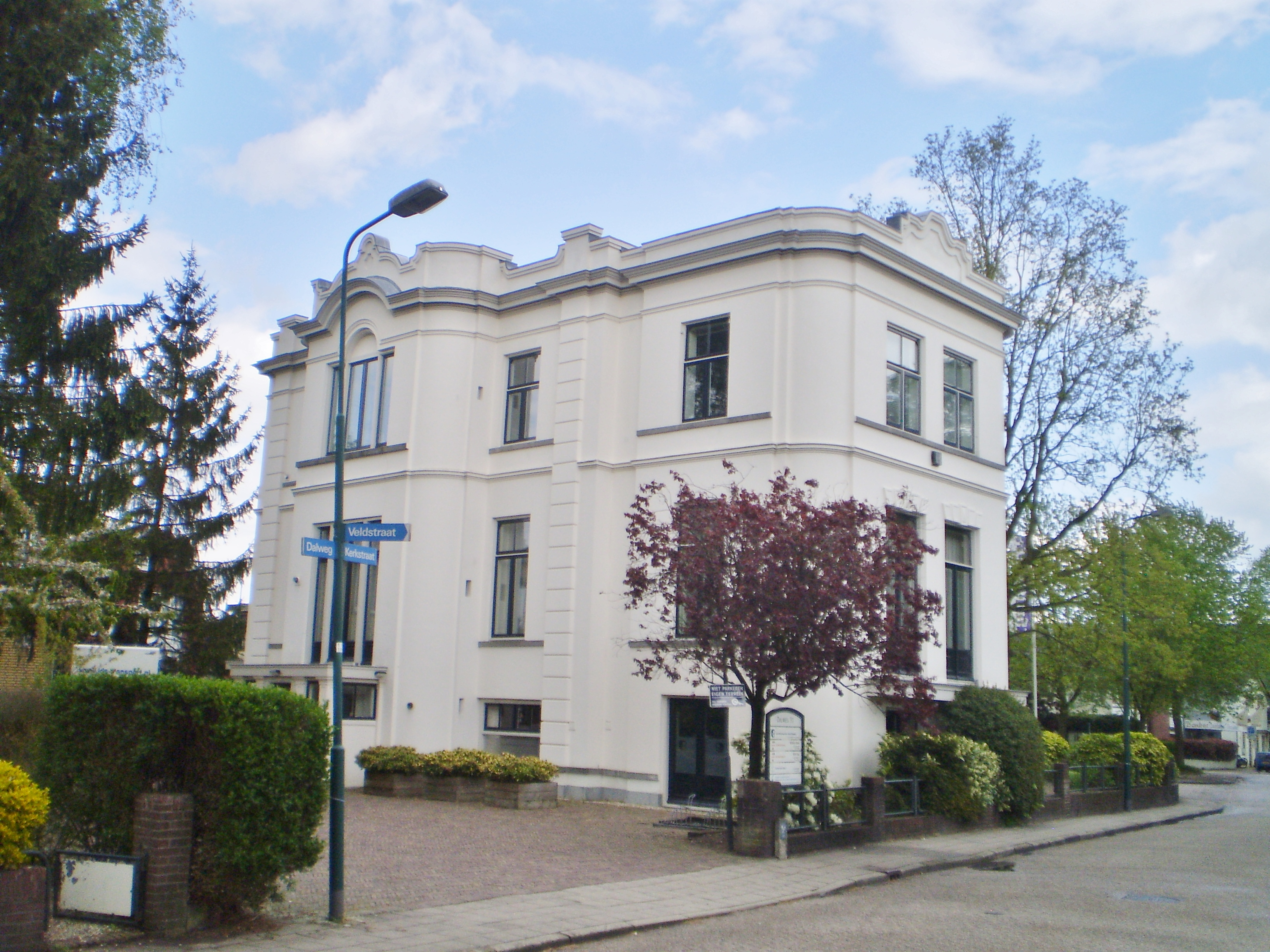 achterzijde van de villa bij slagerij Bokma